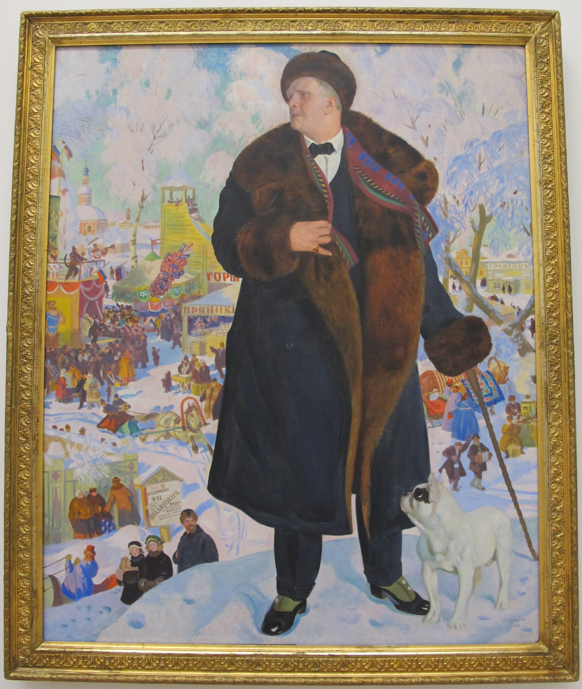 Boris kustodiev, ritratto di fyodor chaliapin, 1922